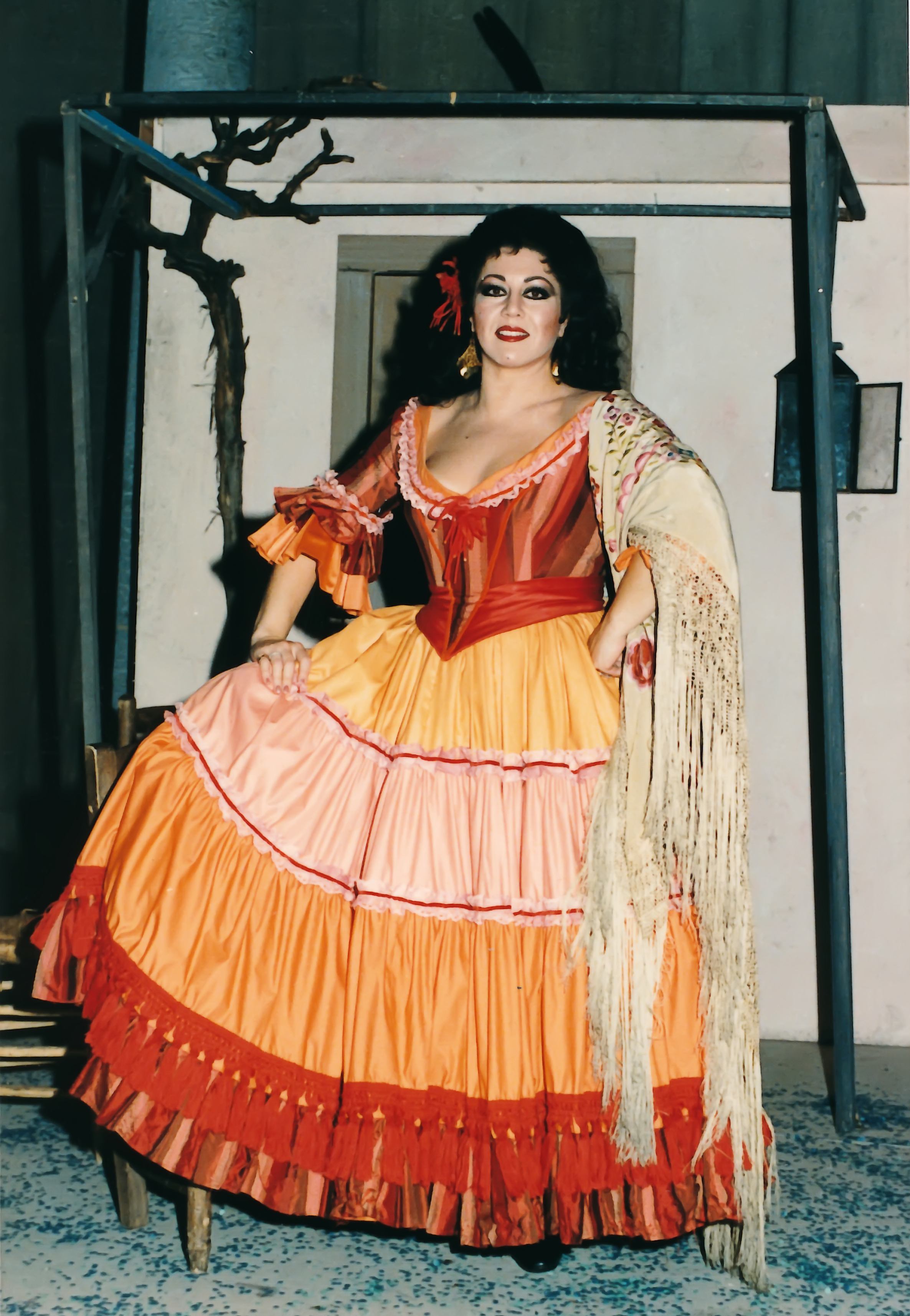 Foto escaneada del original (analogico)